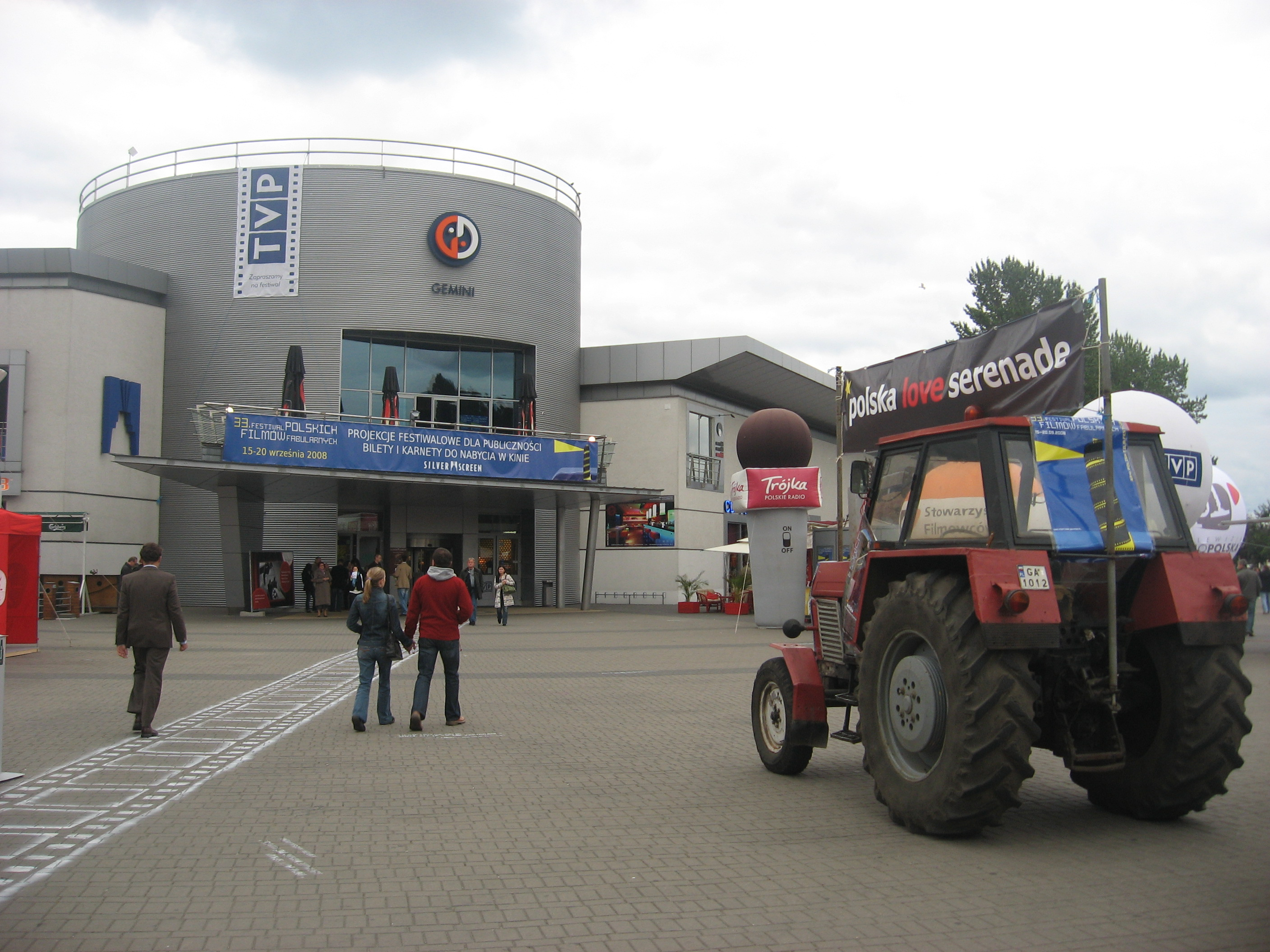 XXXIII Festiwal Polskich Filmów Fabularnych w Gdyni, Silver Screen - miejsce pokazów festiwalowych dla publiczności.